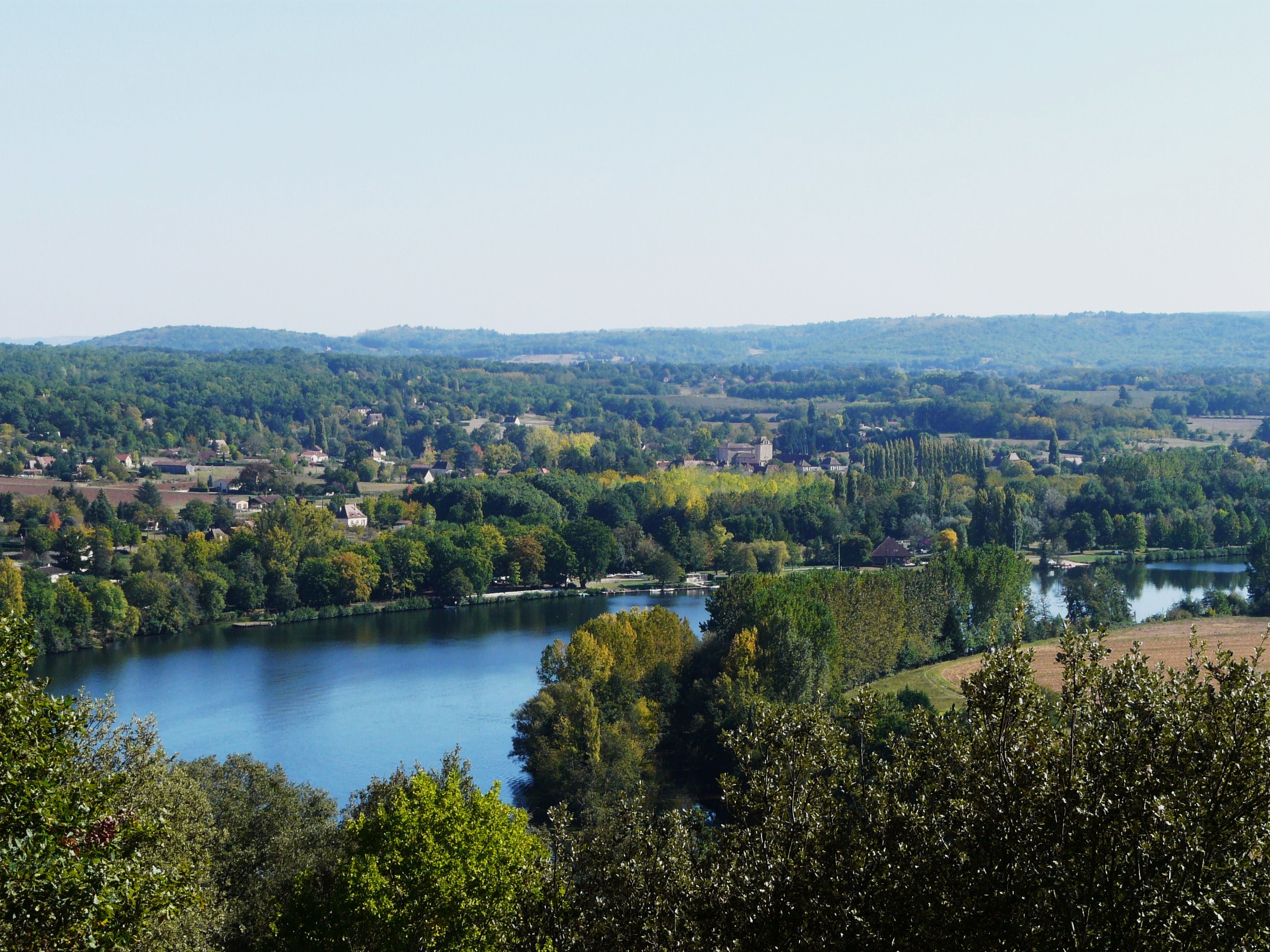 Vallée de la Dordogne : la partie orientale du cingle de Trémolat vue depuis le belvédère du cingle, Dordogne, France.